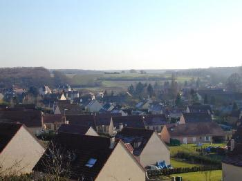 Photo de Houx.